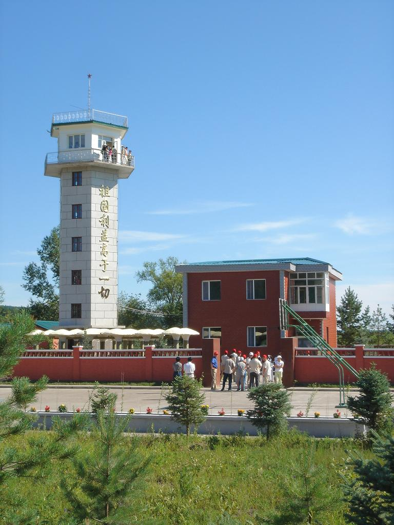 位于黑龙江岸边的中国最北岗哨。维基人Refrain拍摄。